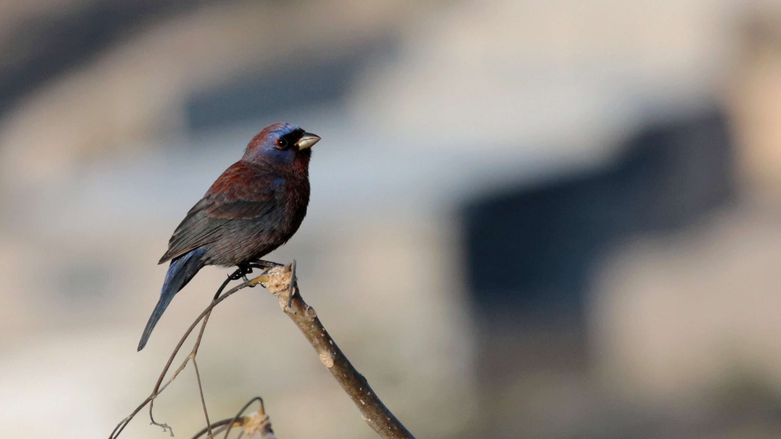 Colorín Morado